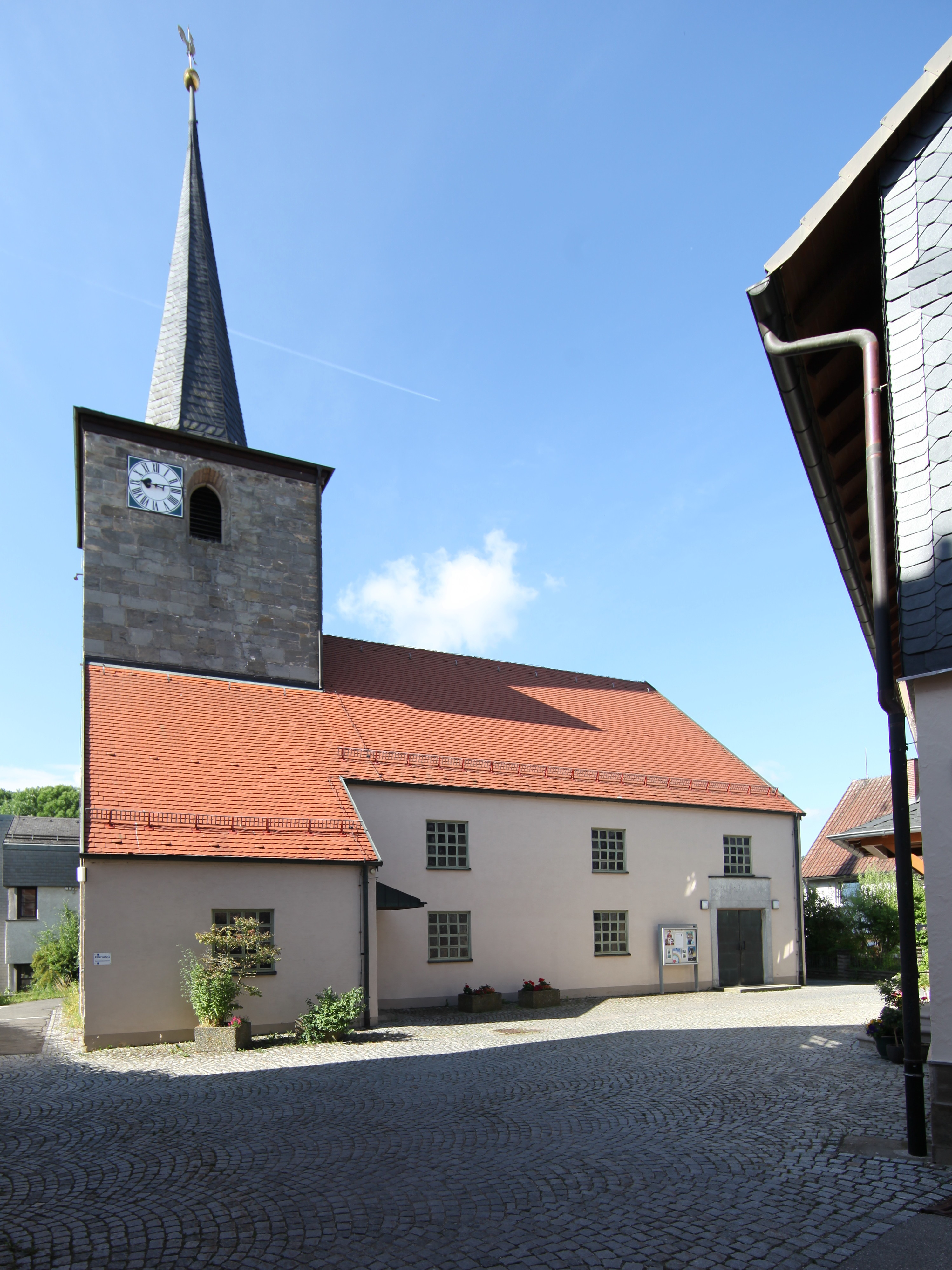 Evangelisch-lutherische Kirche St. Salvator in Untersiemau